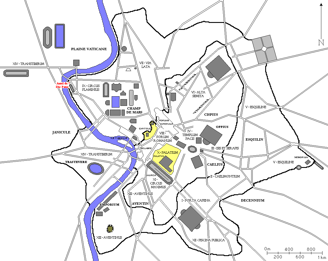 Plan de Rome redessiné à partir de diverses sources. Tous les bâtiments importants construits jusqu'à la fin de l'Empire romain sont dessinés, ainsi que les régions d'Auguste et les collines de Rome. Auteur : ColdEel En rouge, l'Autel de Dis Pater